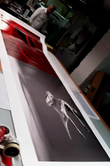 Yonnel Leblanc working on the big size print (315/115cm) of Philippe Robert photography. Model : Dorothée Gilbert, Prima Ballerina of Paris National Opera